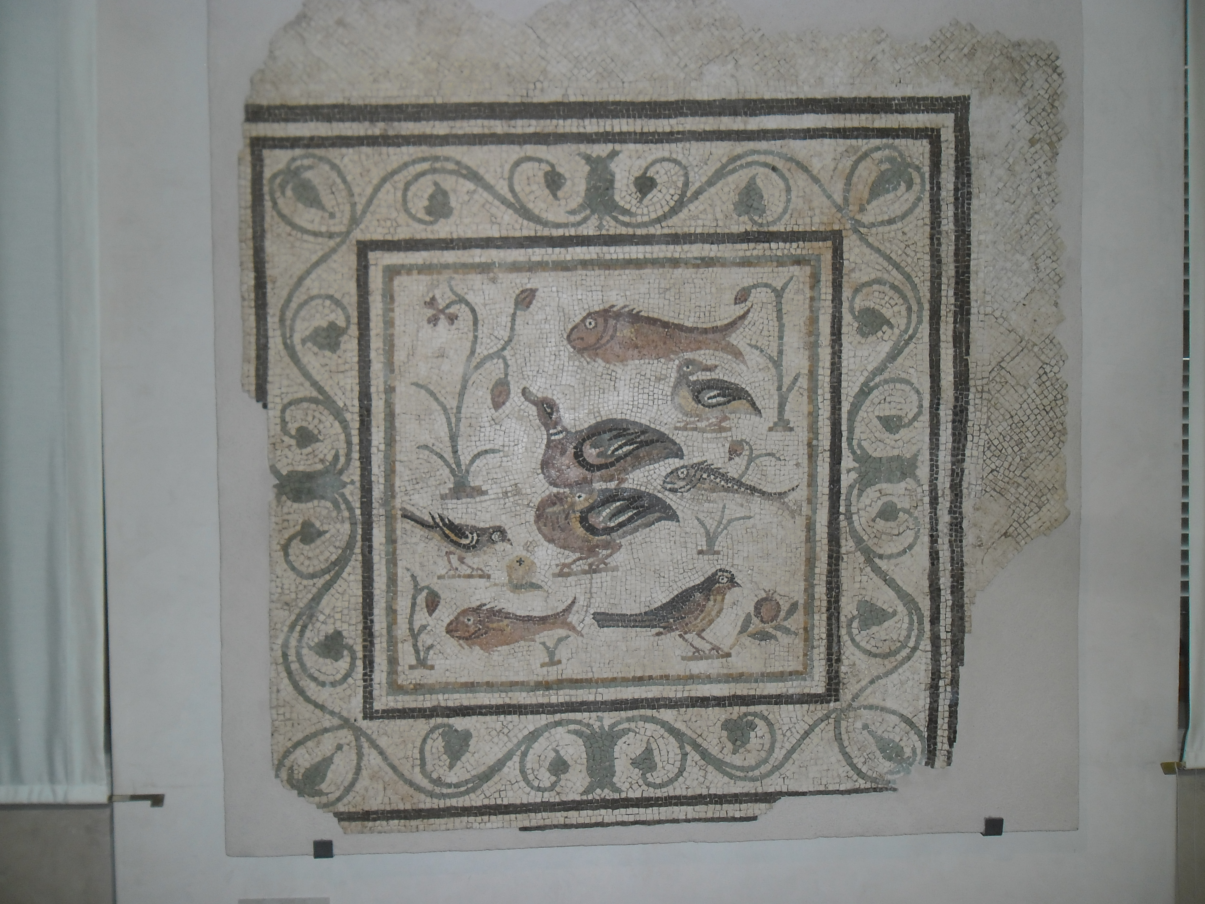 Museo archeologico nazionale delle Marche